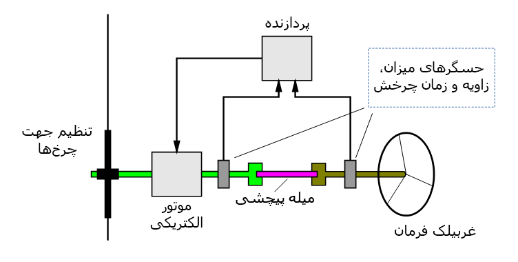 نمودار نحوهٔ عملکرد سیستم فرمان خودکار برقی